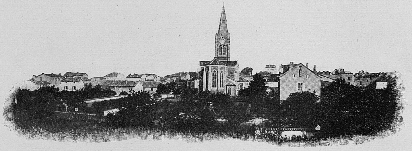 Dictionnaire illustré des communes du département du Rhône. Tome 1 / par MM. E. de Rolland et D. Clouzet.